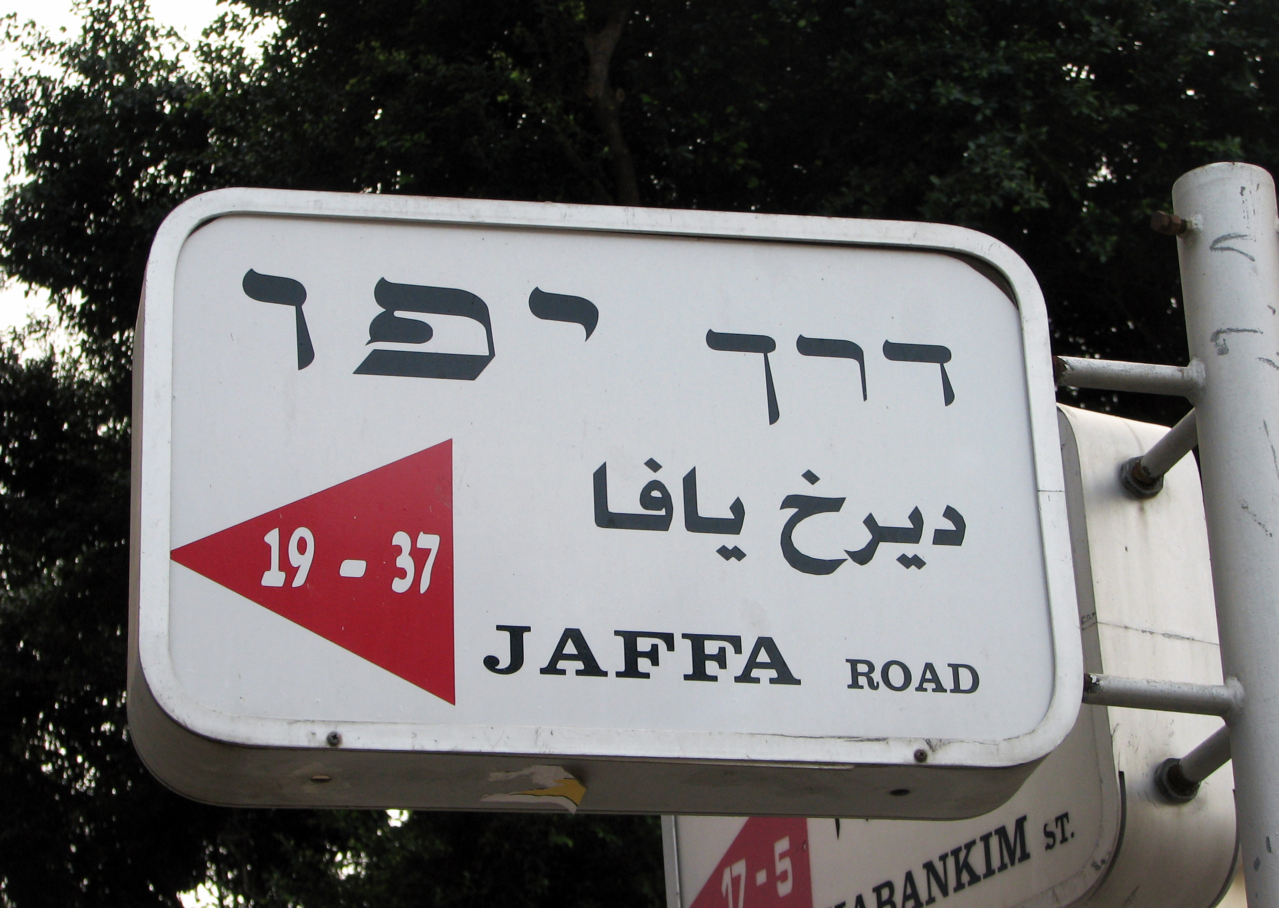 Jaffa St. Haifa Israel מראות בדרך יפו בעיר התחתית בחיפה. דרך יפו היא דרך היסטורית שתחילתה בימי דאהר אל-עומר שהקים ב-1761 את "חיפה החדשה" שלט הרחוב בקטע בין רחוב הבנקים ורחוב נתנזון